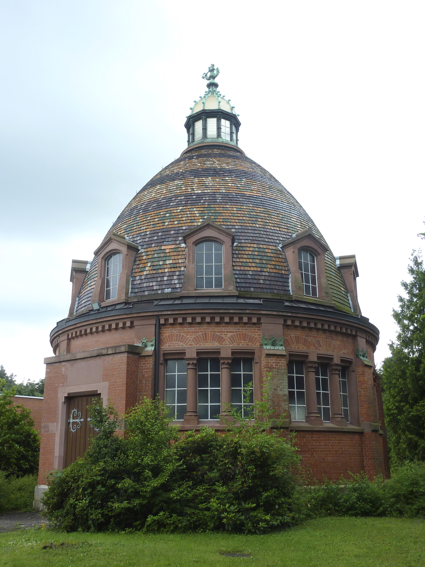 Stadt Frankfurt am Main: Das Wasserwerk Hinkelstein ist ein Trinkwasser-Pumpwerk im äußersten Westen des Frankfurter Stadtwaldes auf der Gemarkung des Stadtteils Schwanheim. Das Foto zeigt den 1894 eingeweihten, unter Denkmalschutz stehenden Backstein-Kuppelbau über dem Pumpwerk, Ansicht von Nordosten